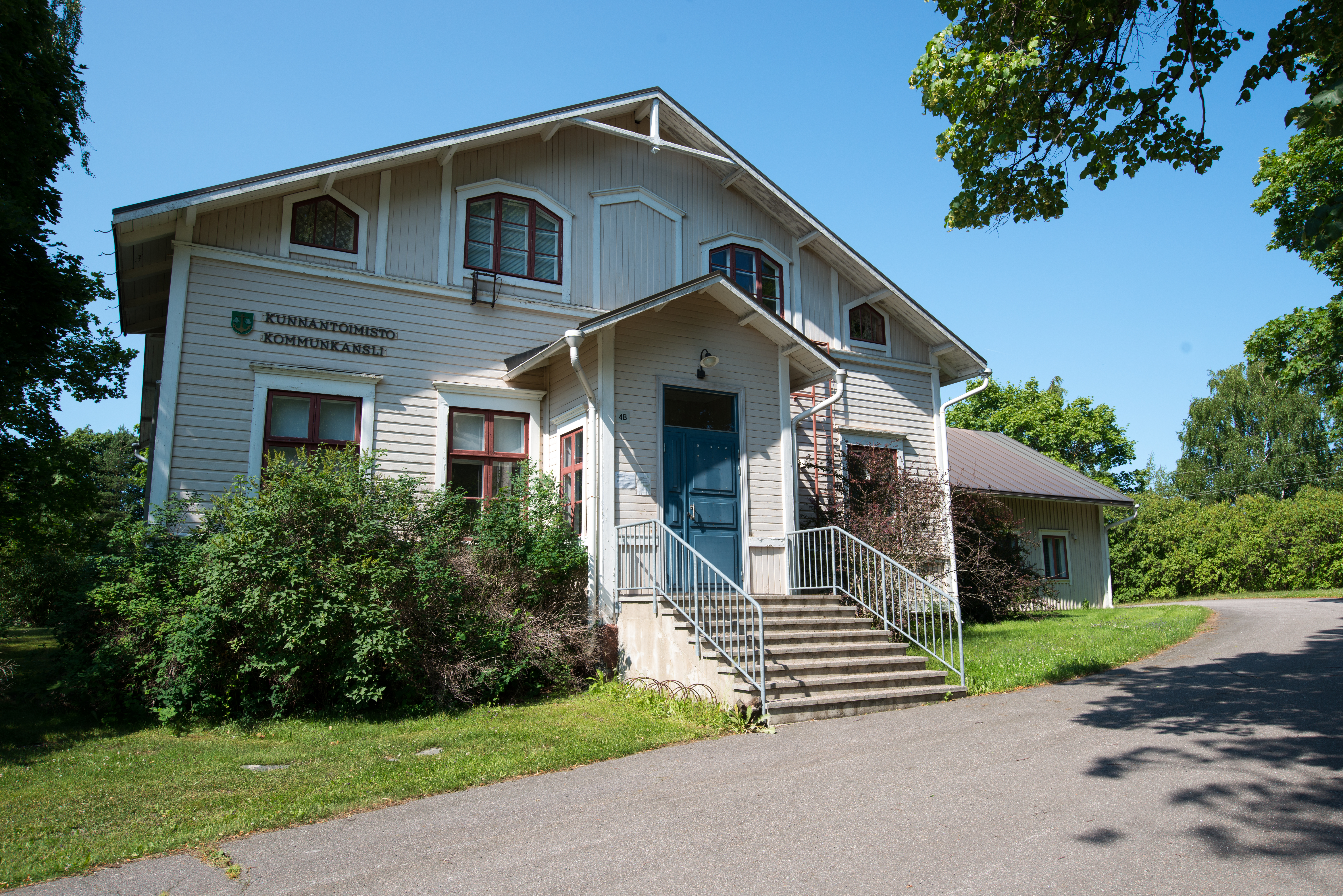 Särkisalon kunnantoimisto